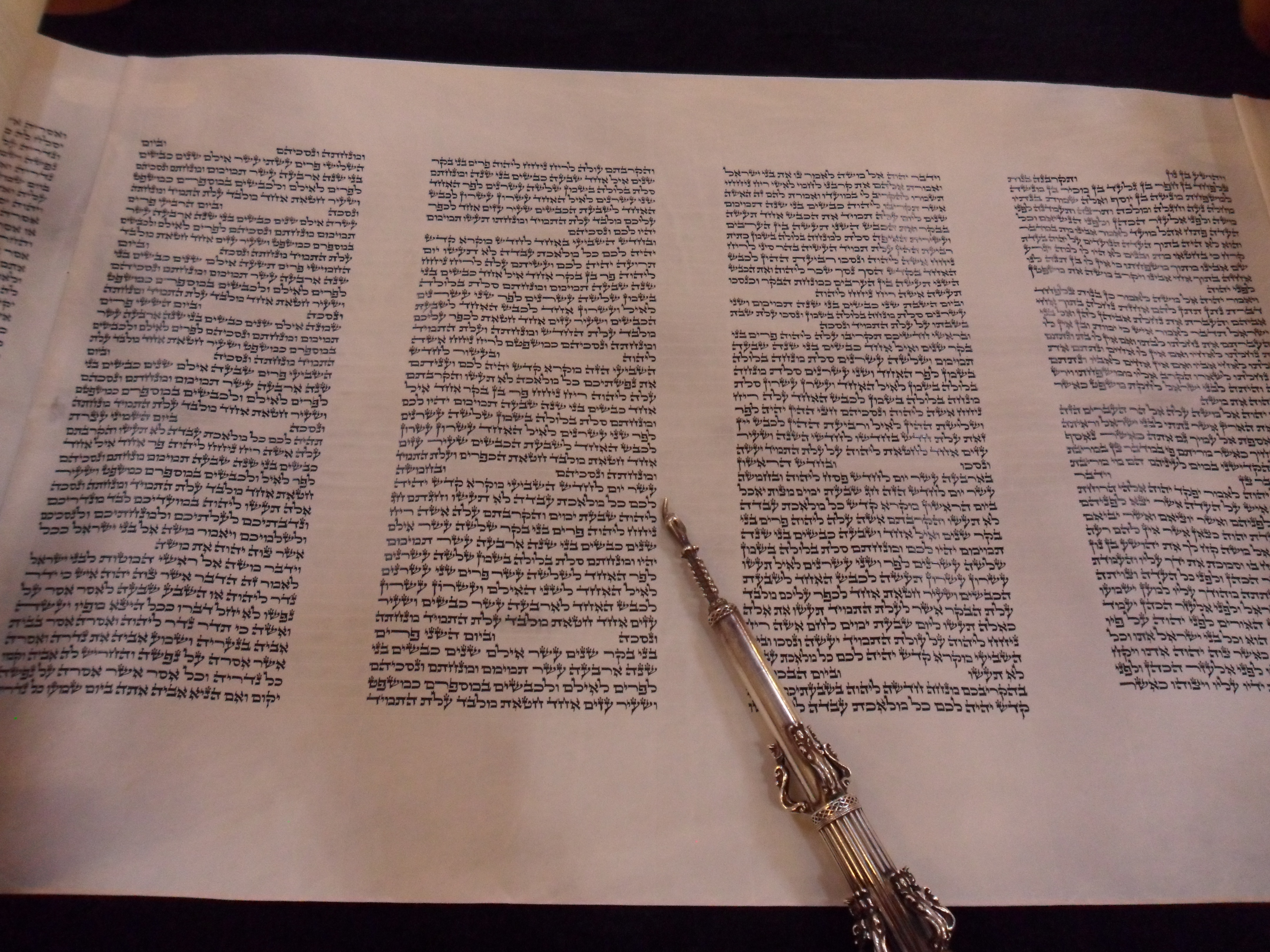 Rouleaux de la Torah dans la synagogue Beth Yaacov accompagnés d'un yad